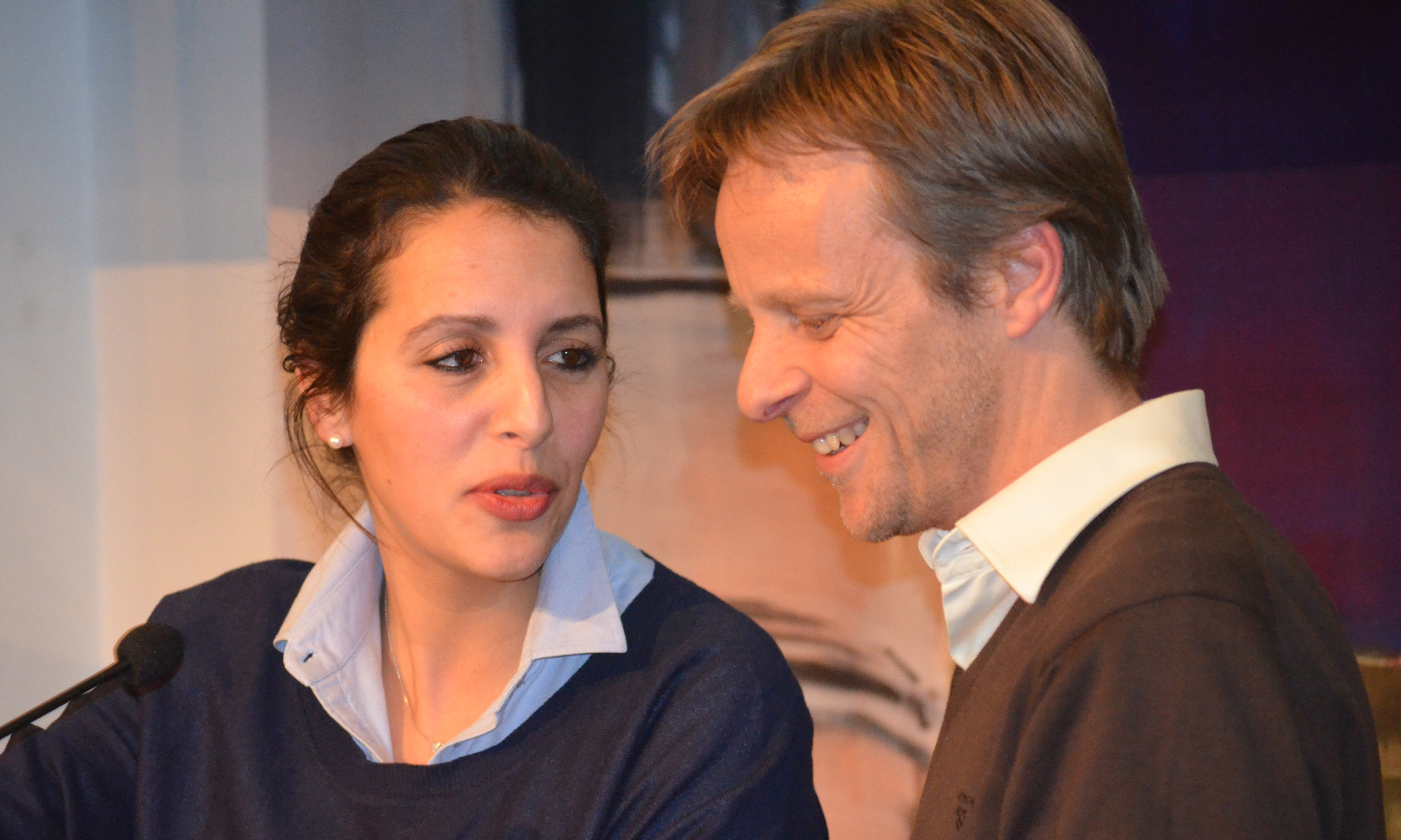 Zakia Khattabi et Patrick Dupriez, candidats à la coprésidence du parti politique belge Écolo lors du débat organisé le 2 mars 2015 à Charleroi.